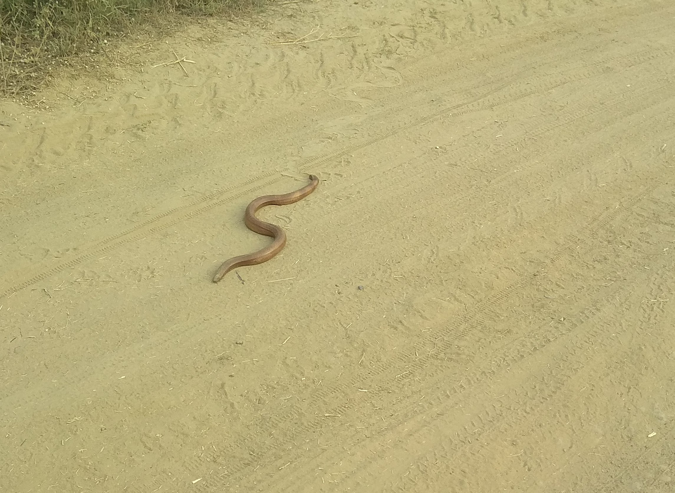 क्षेत्रीय नाम कुचरेढ़